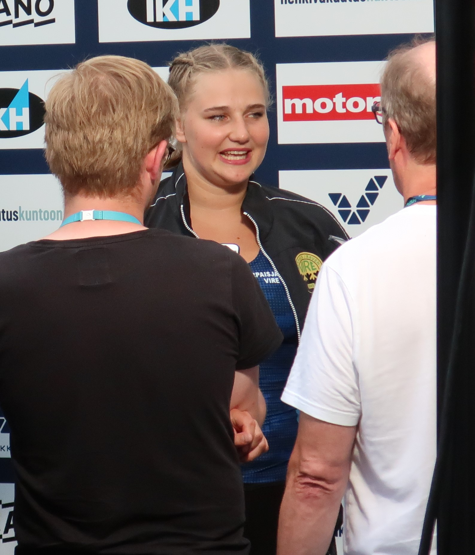 Senja Mäkitörmä Jyväskylän Kalevan kisoissa 2018 kuulantyönnön loppukilpailun jälkeen haastateltavana.